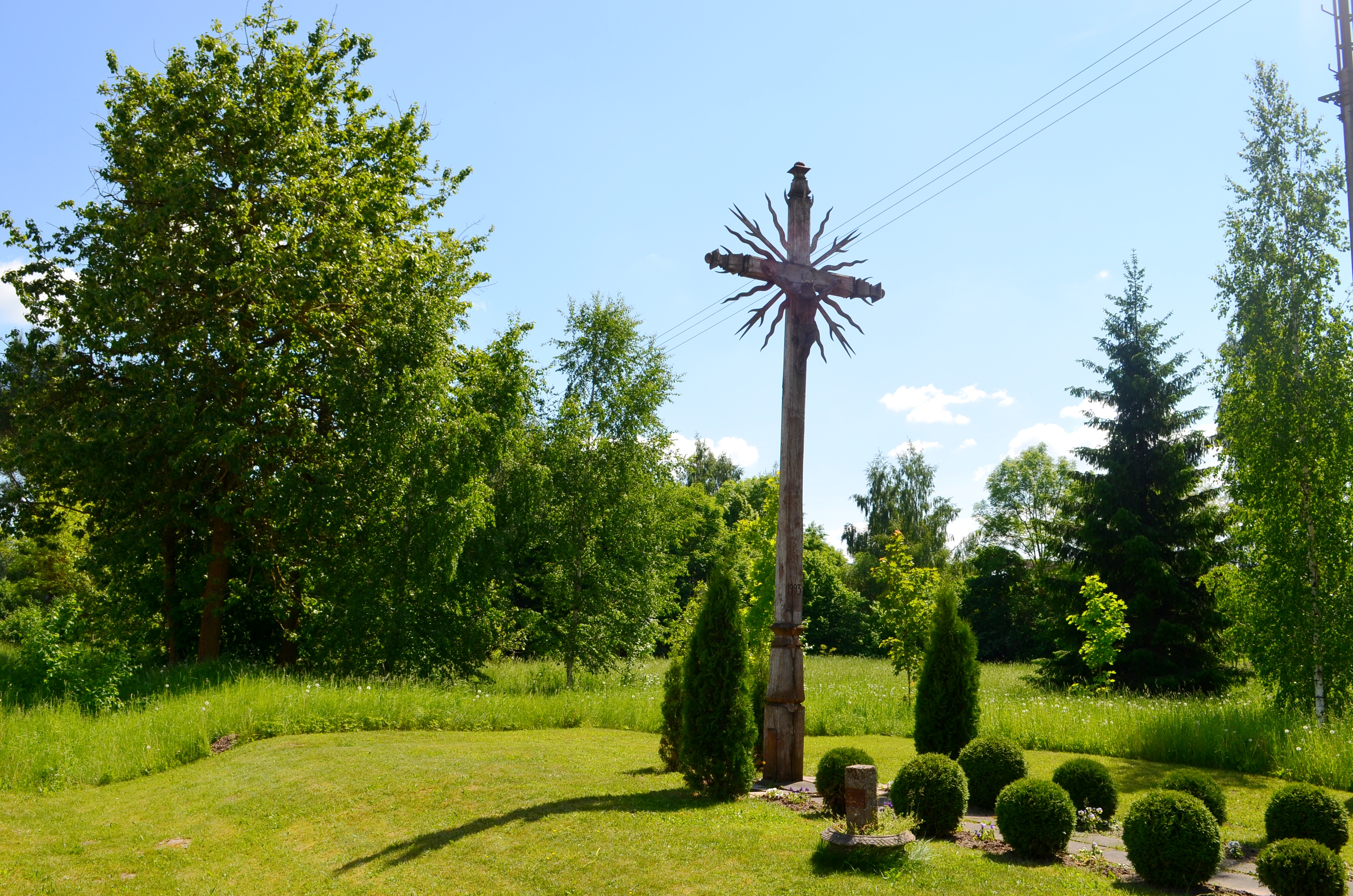 Stungių kaimo kryžius, Joniškio raj.